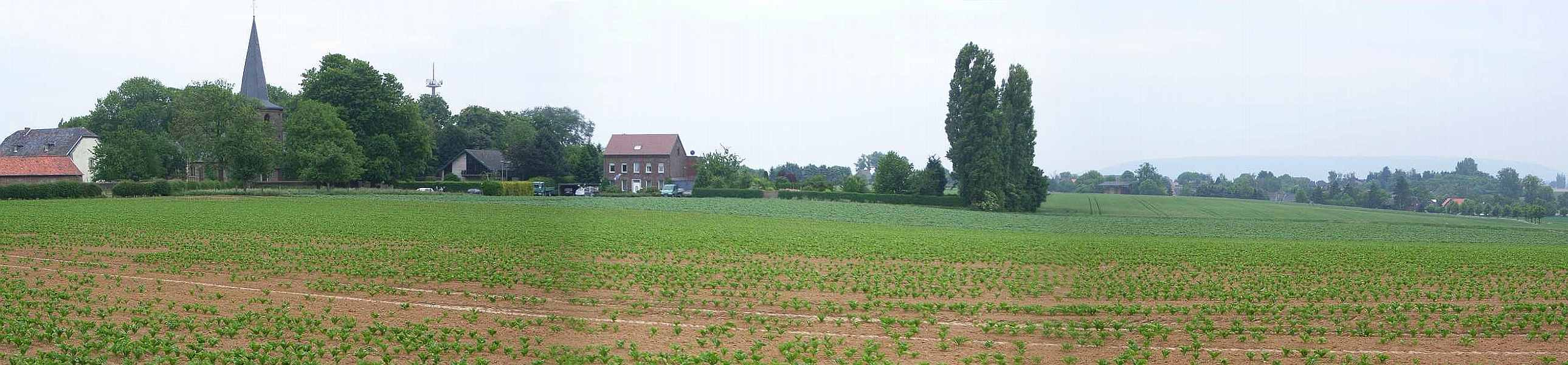 Panoramamontage: Die Ortschaften Mündt und Opherten